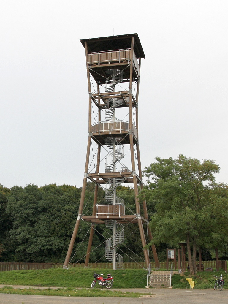 Rozhledna u Nedánova.